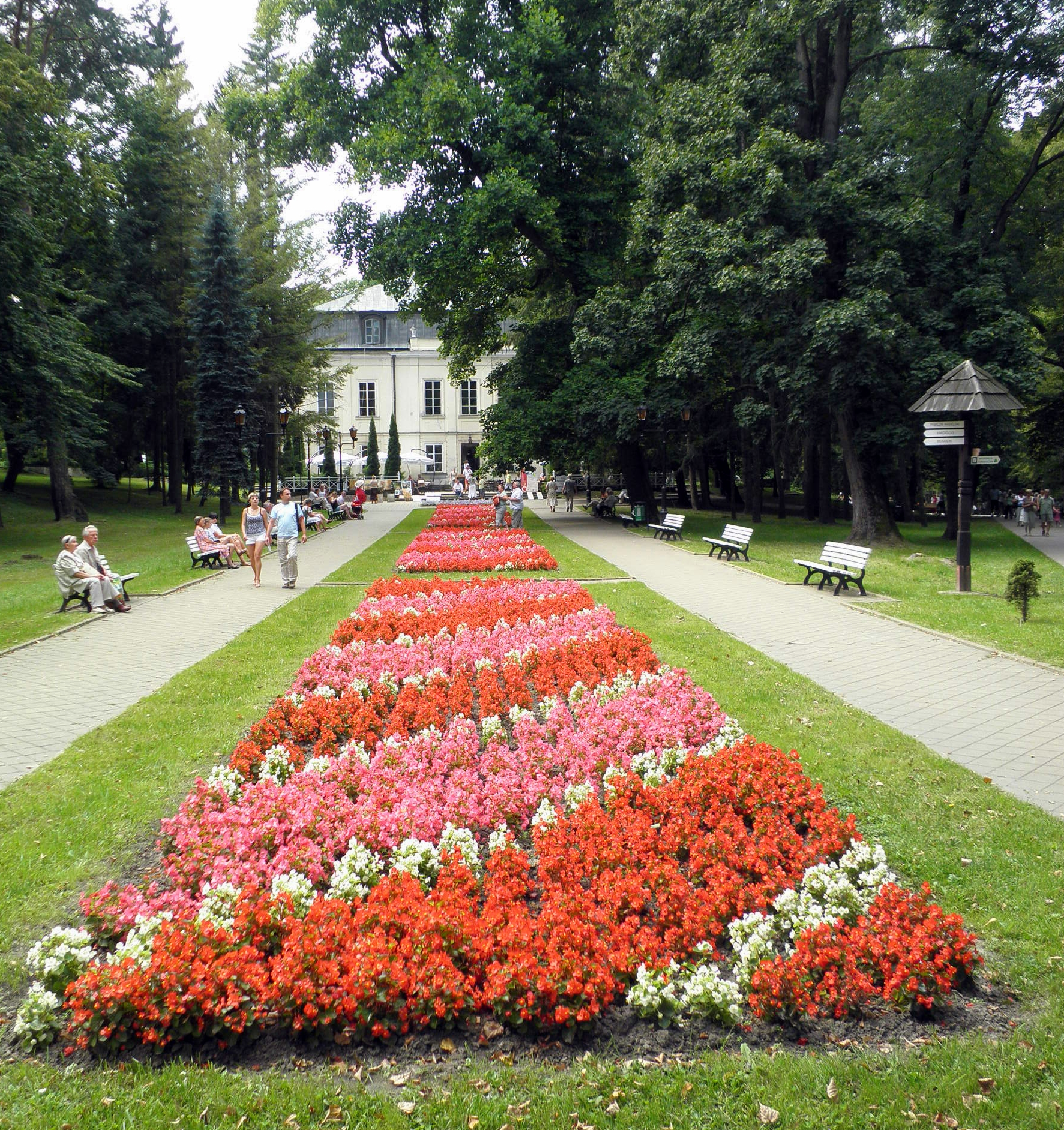 Rabatka kwiatowa przed pałacem Małachowskich w zespole pałacowo-parkowym w Nałęczowie (A/257